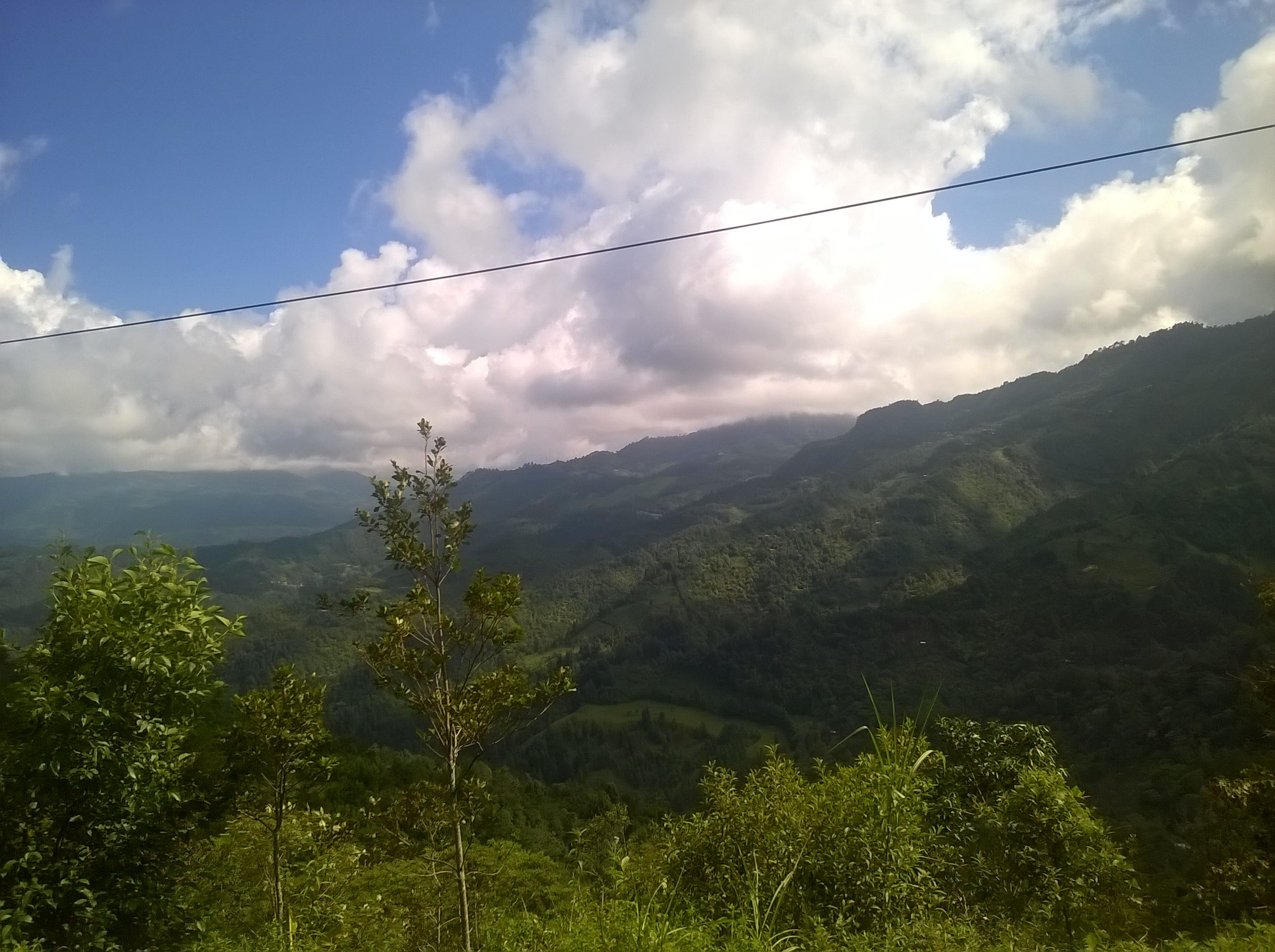 Paisaje de la sierra en Los Reyes, Veracruz